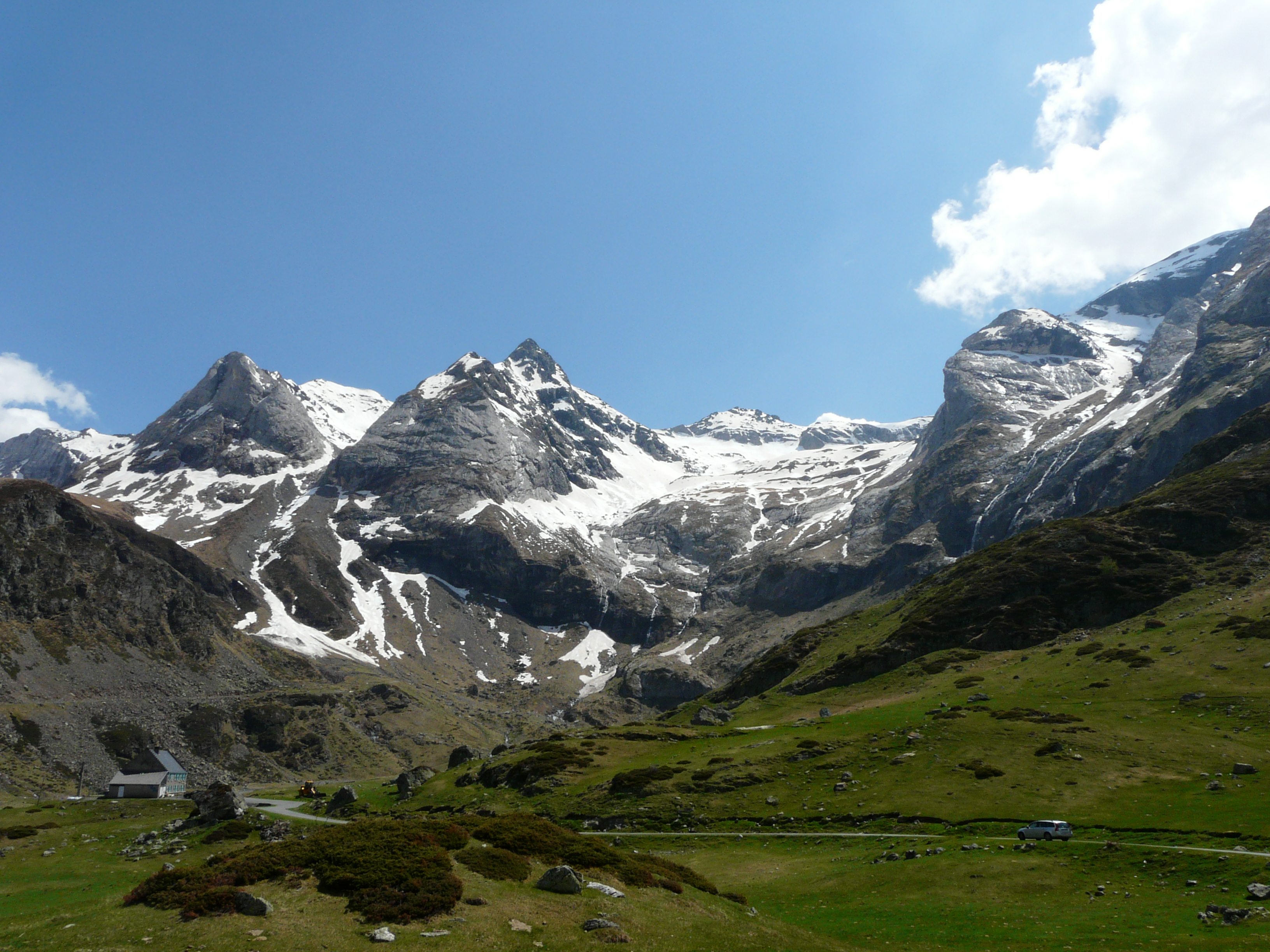 Le cirque de Troumouse, Gèdre, Hautes-Pyrénées, France.